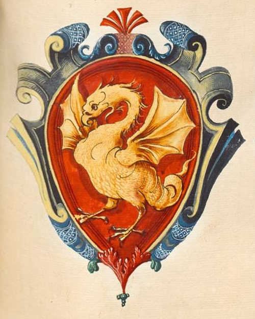 Brasão da família De Panceris / Panceri da região de Milão